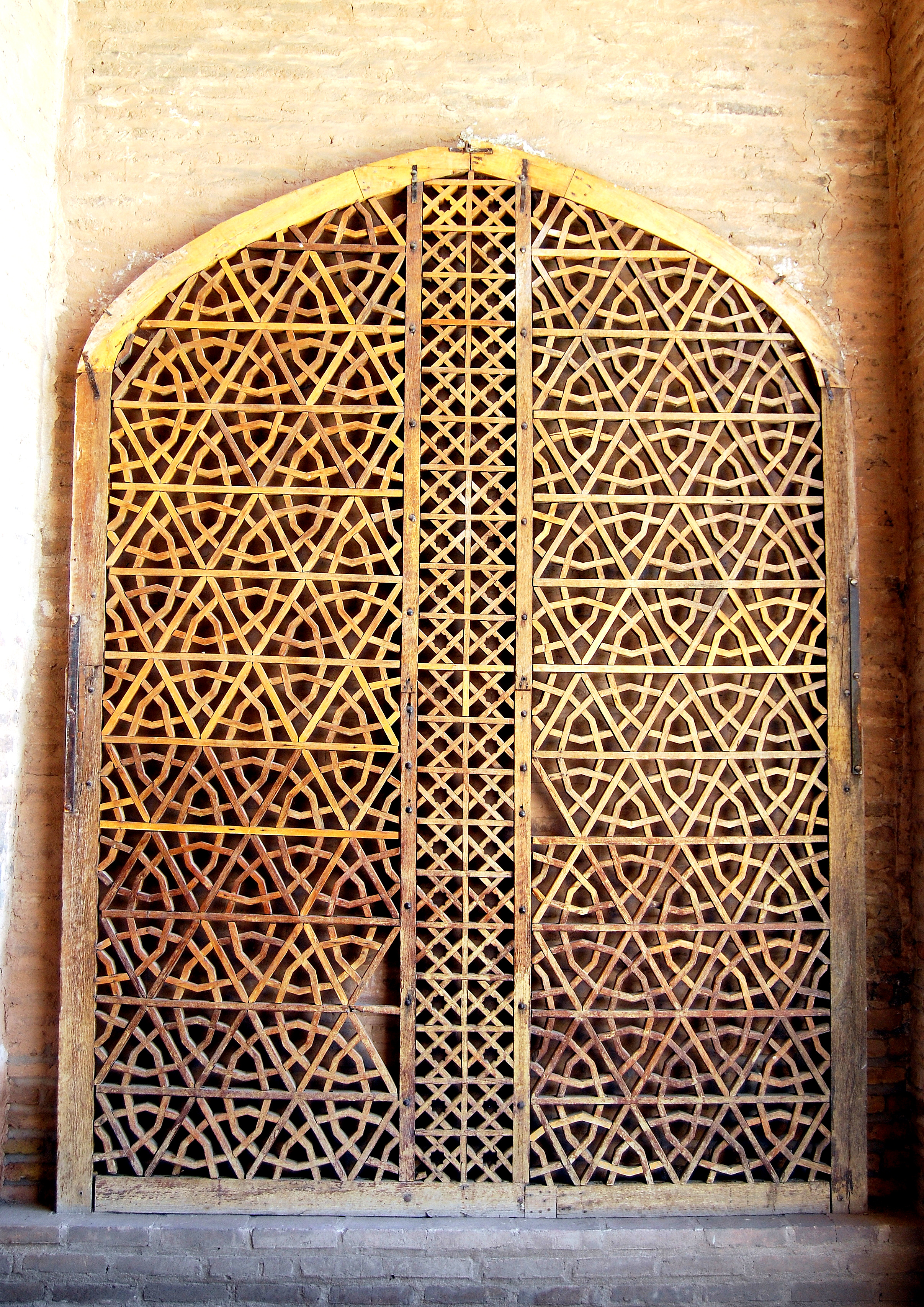 در قدیمی کاروان‌سرای عباسی نیشابور که به سبک گره‌چینی تهیه شده